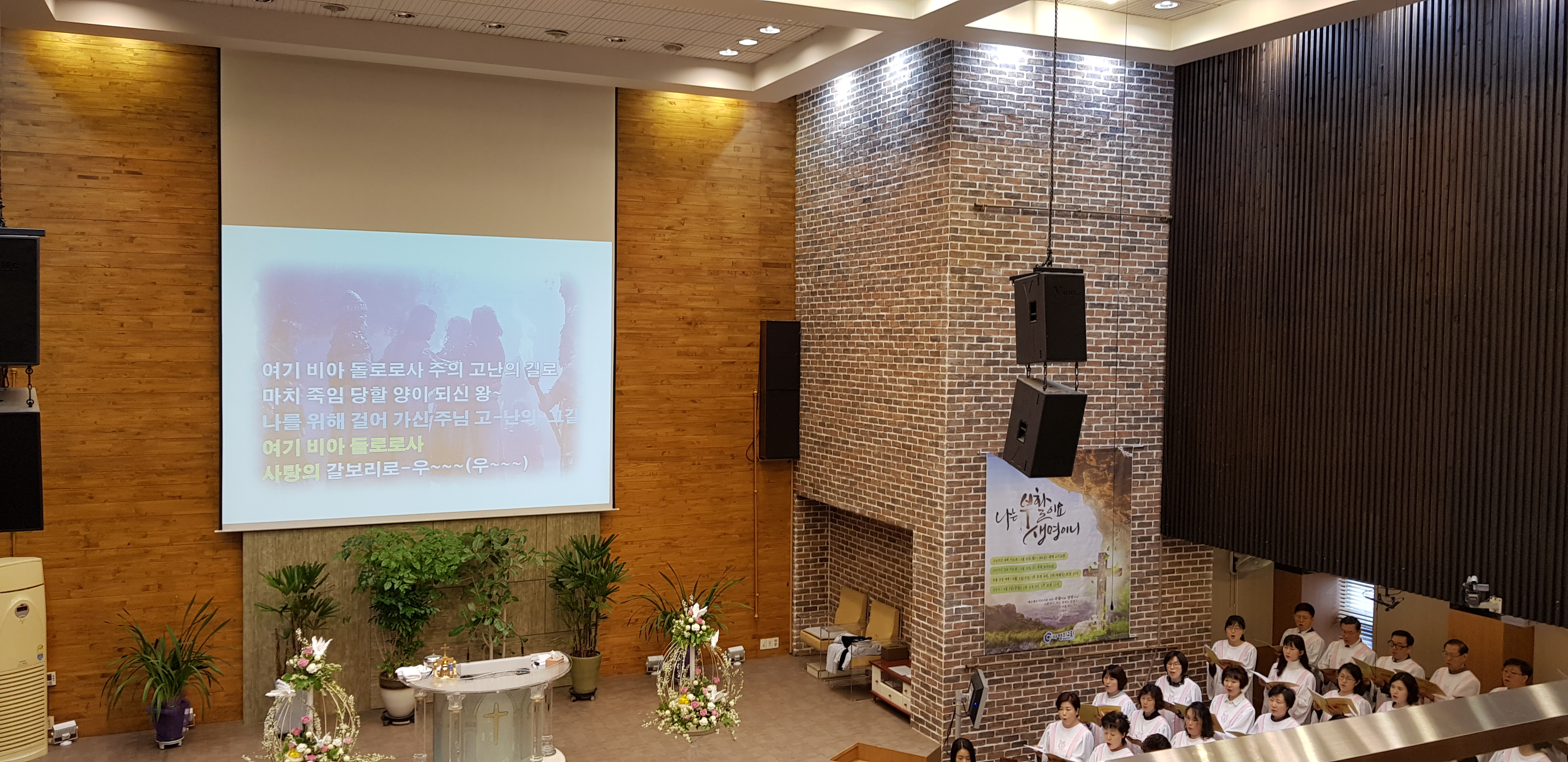 비아 돌로사 찬양 수원 사명의 교회